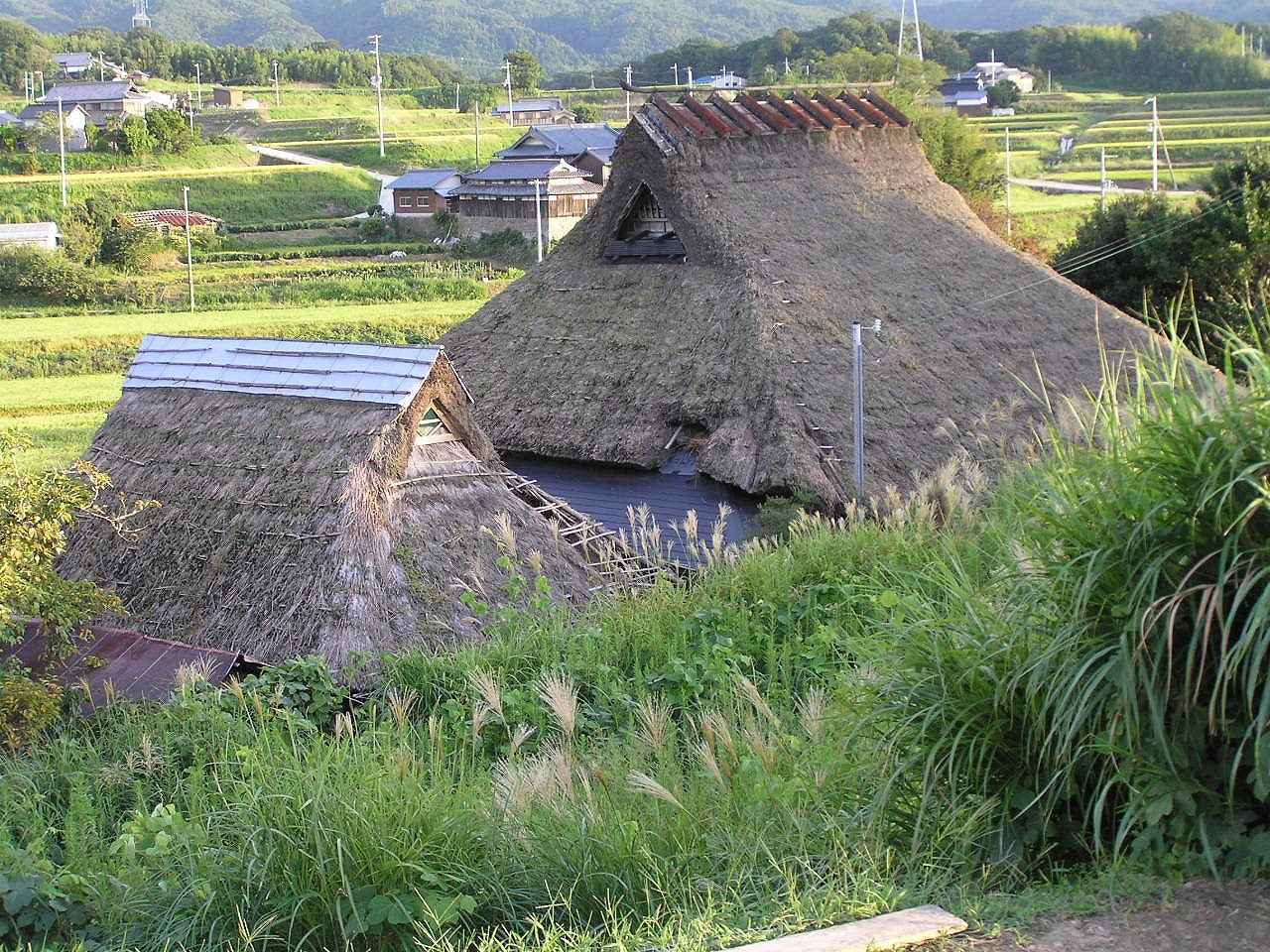 神戸市北区北僧尾の古民家